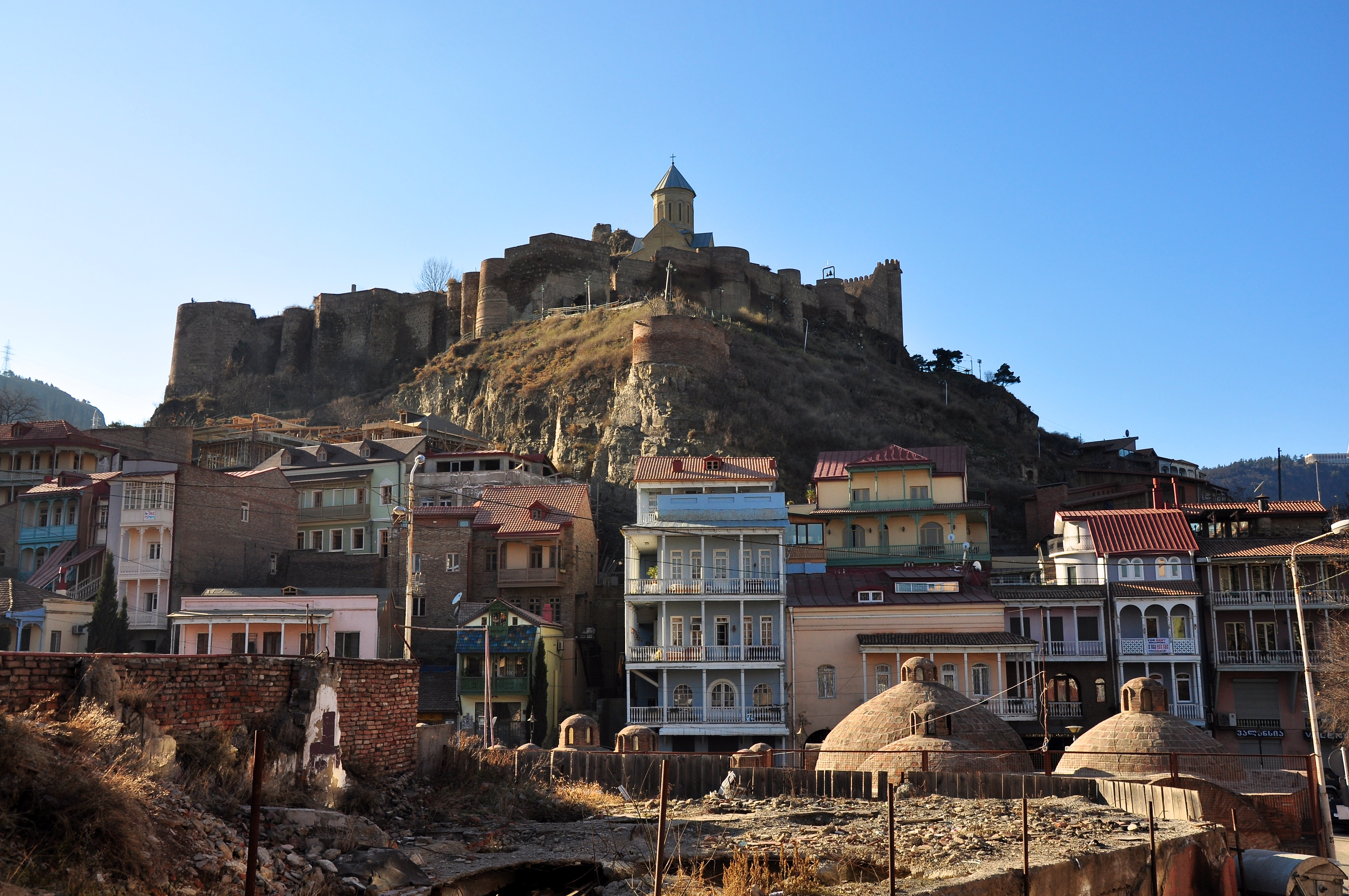 Le quartier des bains, Tbilisi.